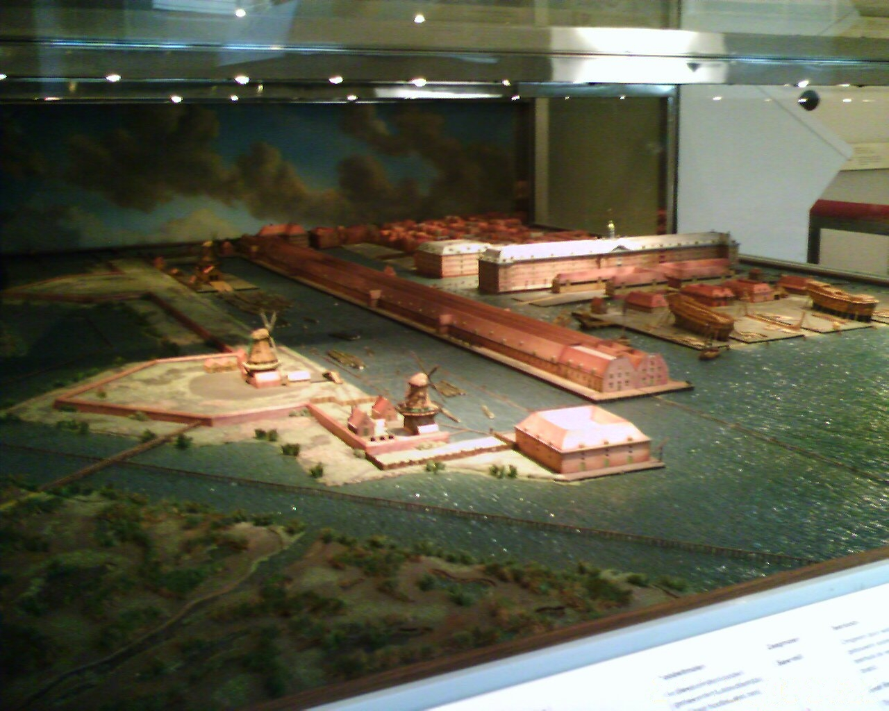 Model van de VOC-werf in de Czaar Peterbuurt